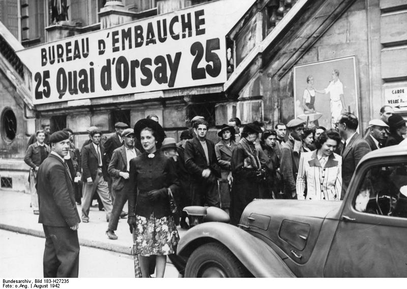 Zentralbild II. Weltkrieg 1939-45 Deutsches Werbebüro für französische Arbeitskräfte zur Arbeit in Deutschland in Paris am Quai d. Orsay, August 1942.